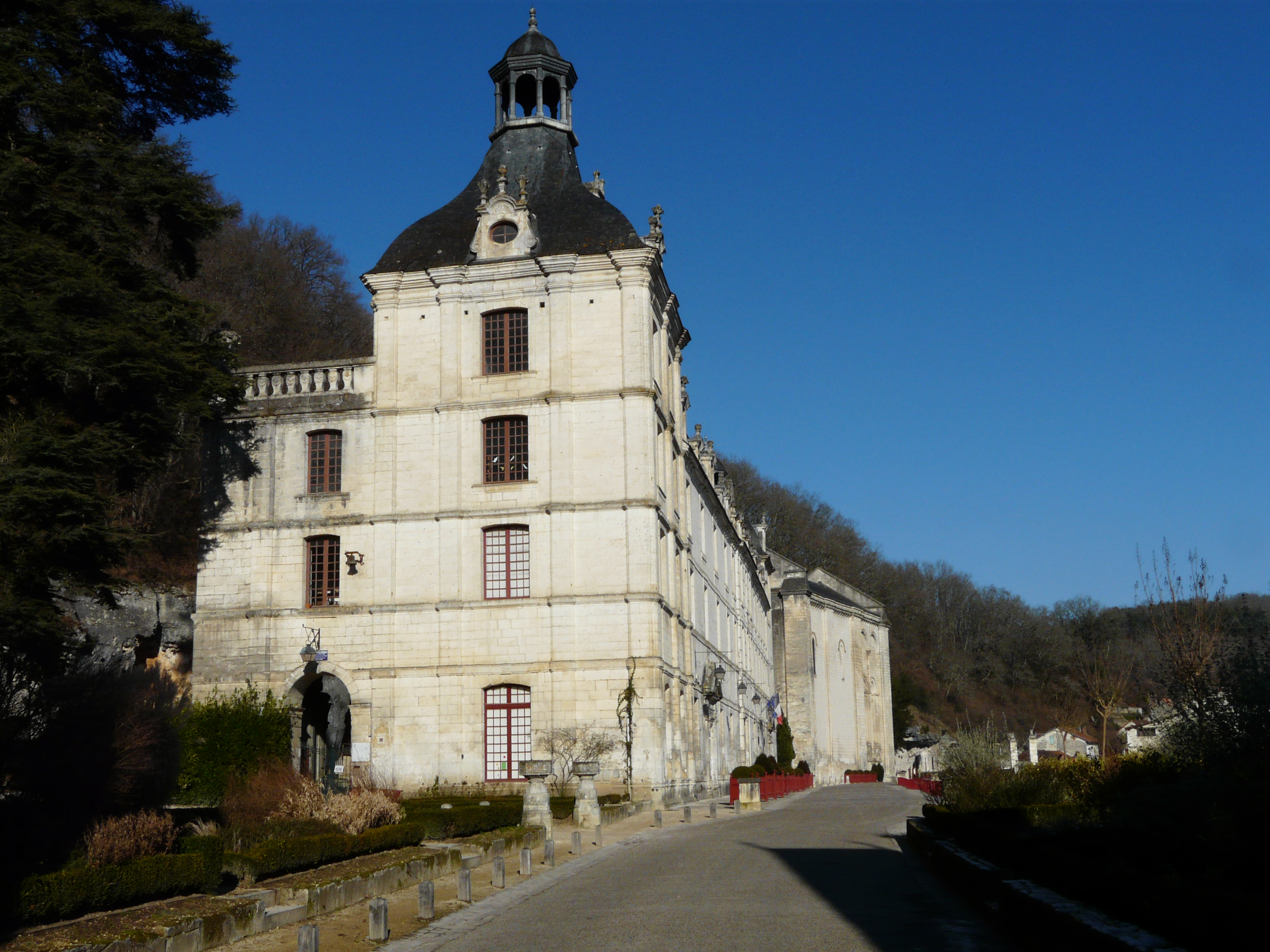 Pavillon à l'angle sud des bâtiments conventuels, abbaye Saint-Pierre, Brantôme, Dordogne, France